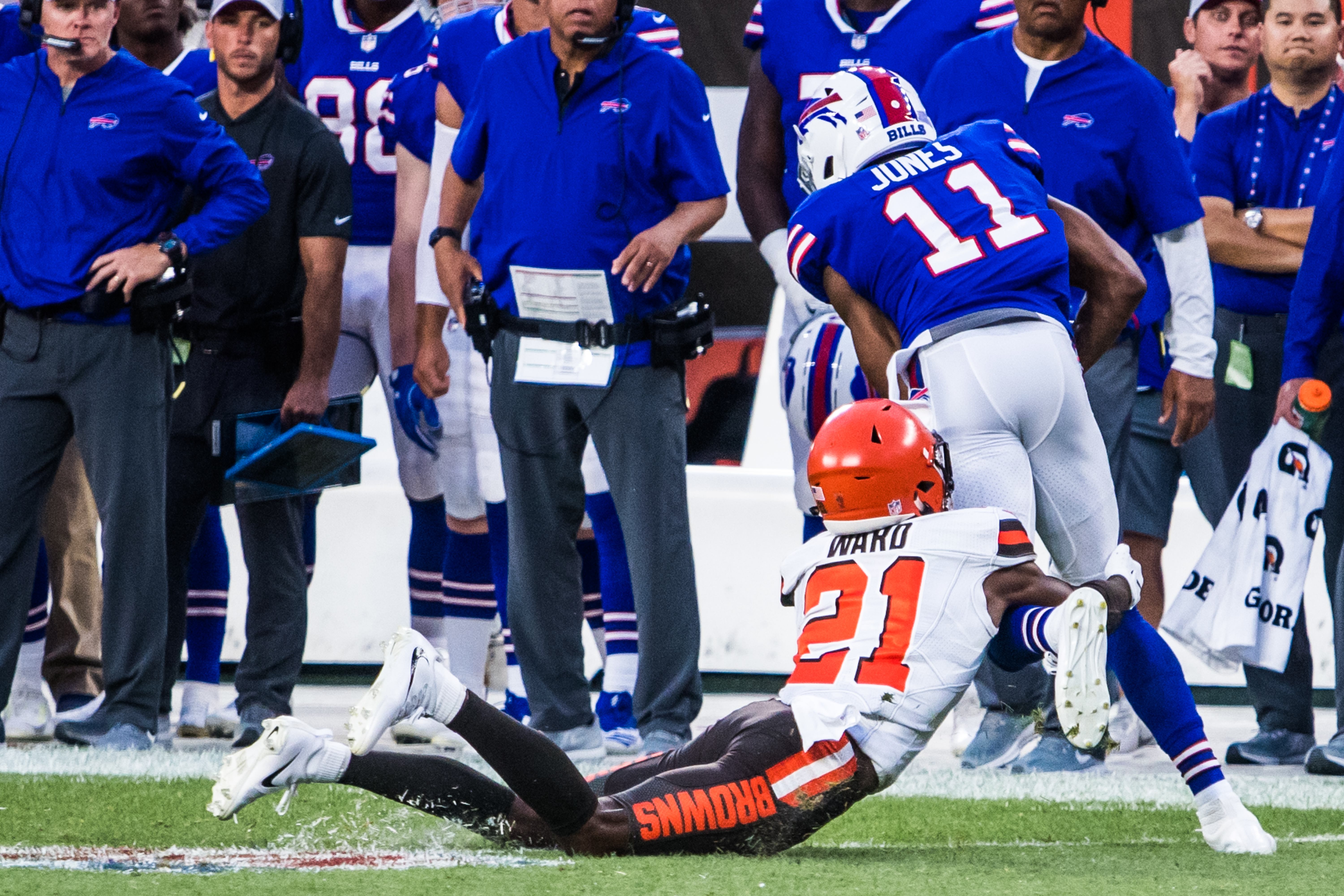 Denzel Ward